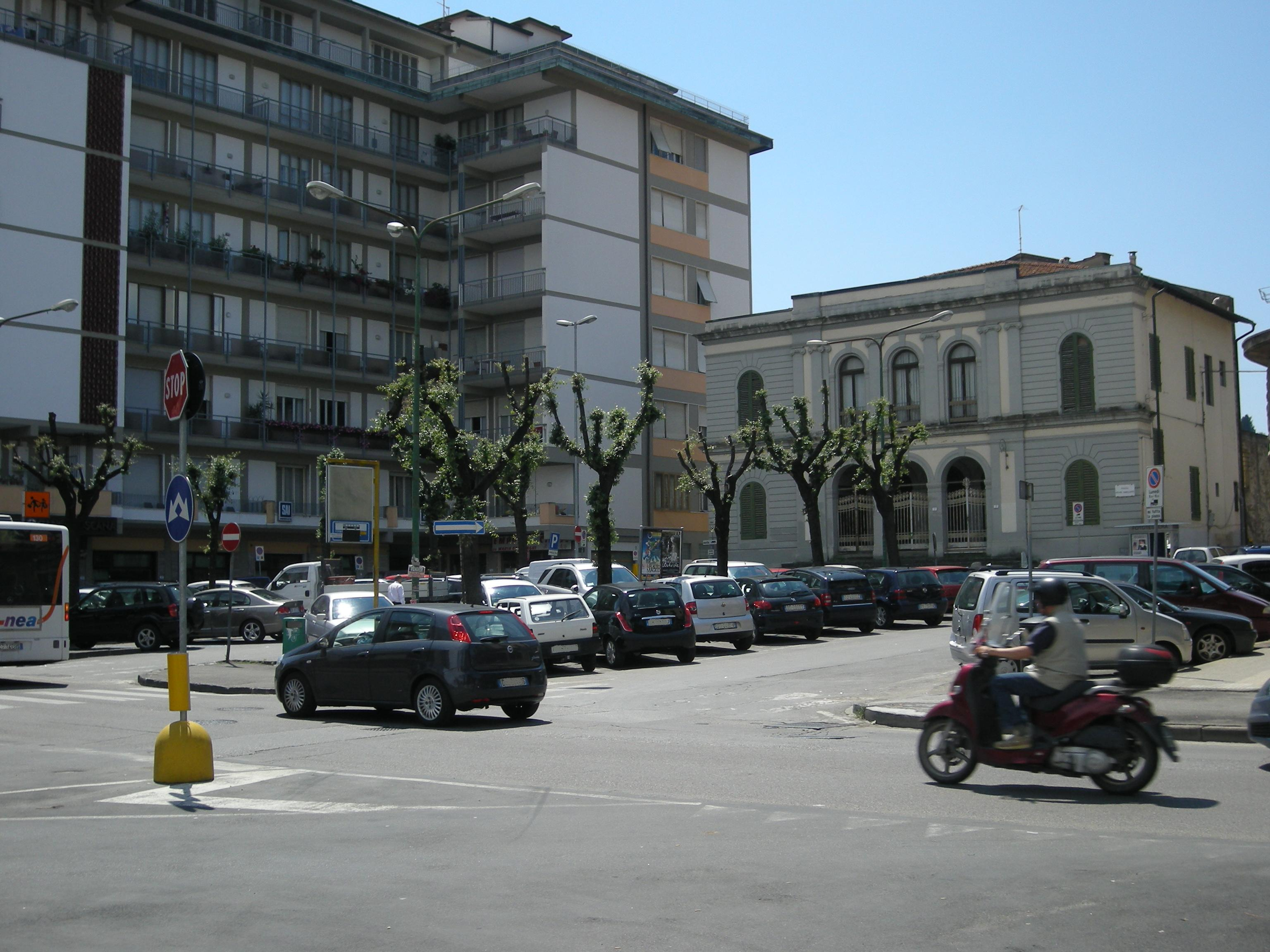 Piazza Cavallotti a Signa (FI).